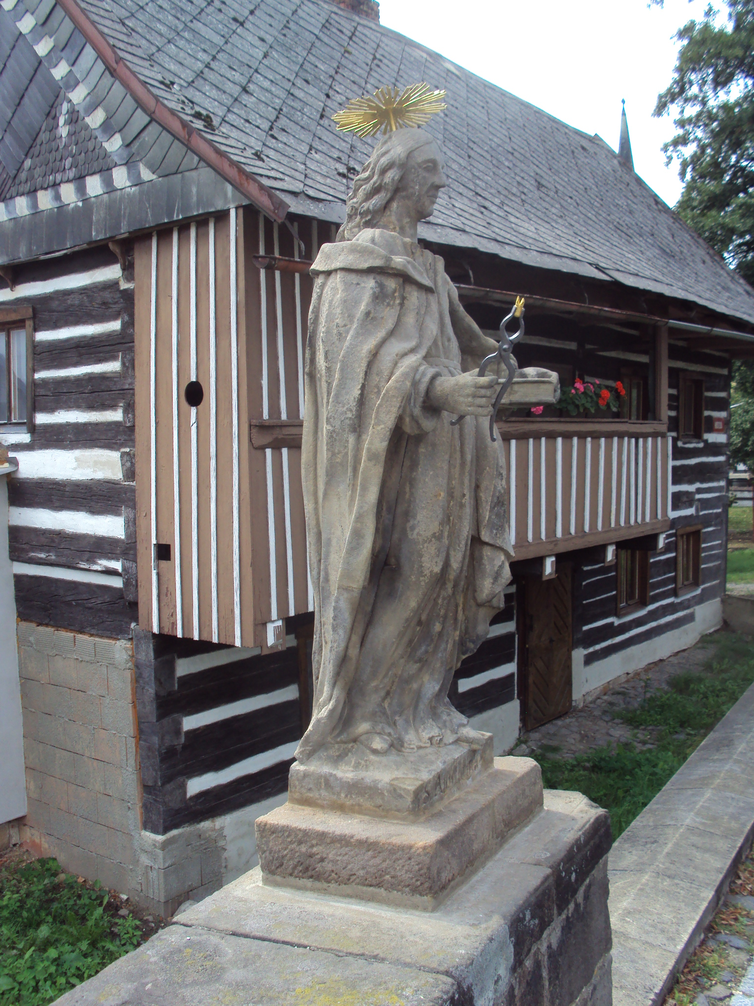 Socha na mostě přes Svitávku, Mostecká, Zákupy